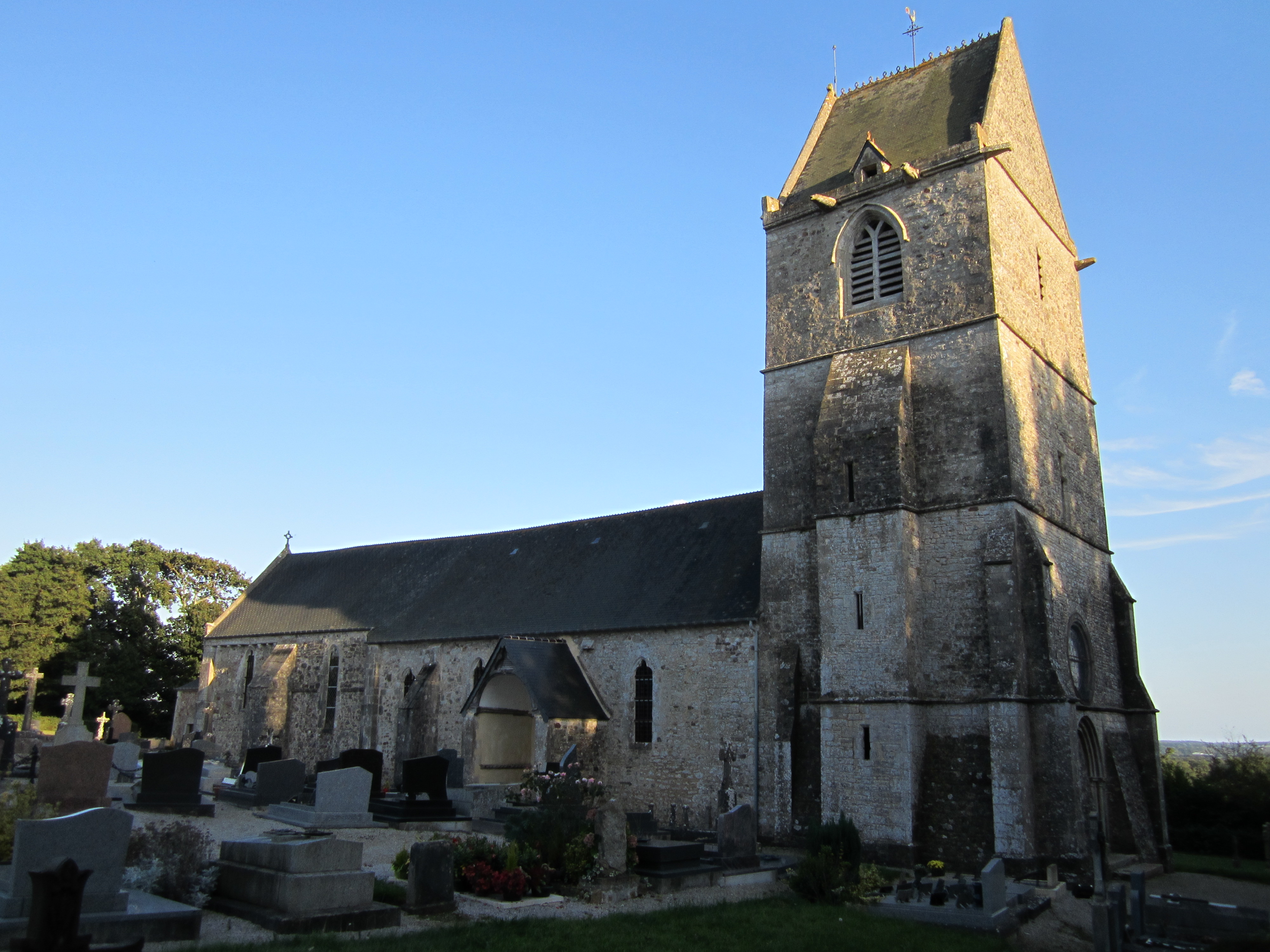 Église Notre-Dame de Magneville .